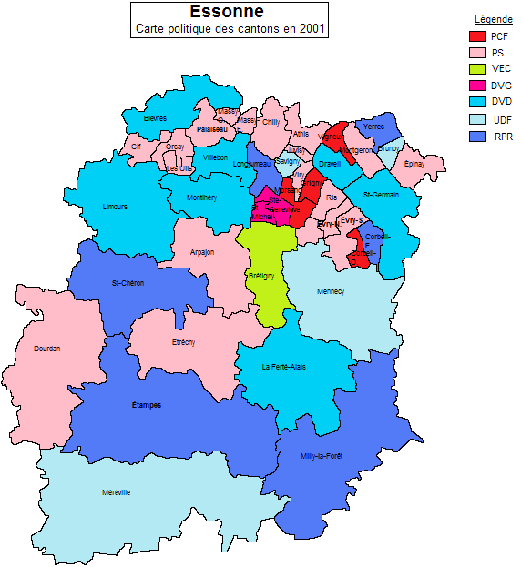 Carte politique des cantons de l'Essonne en 2001.